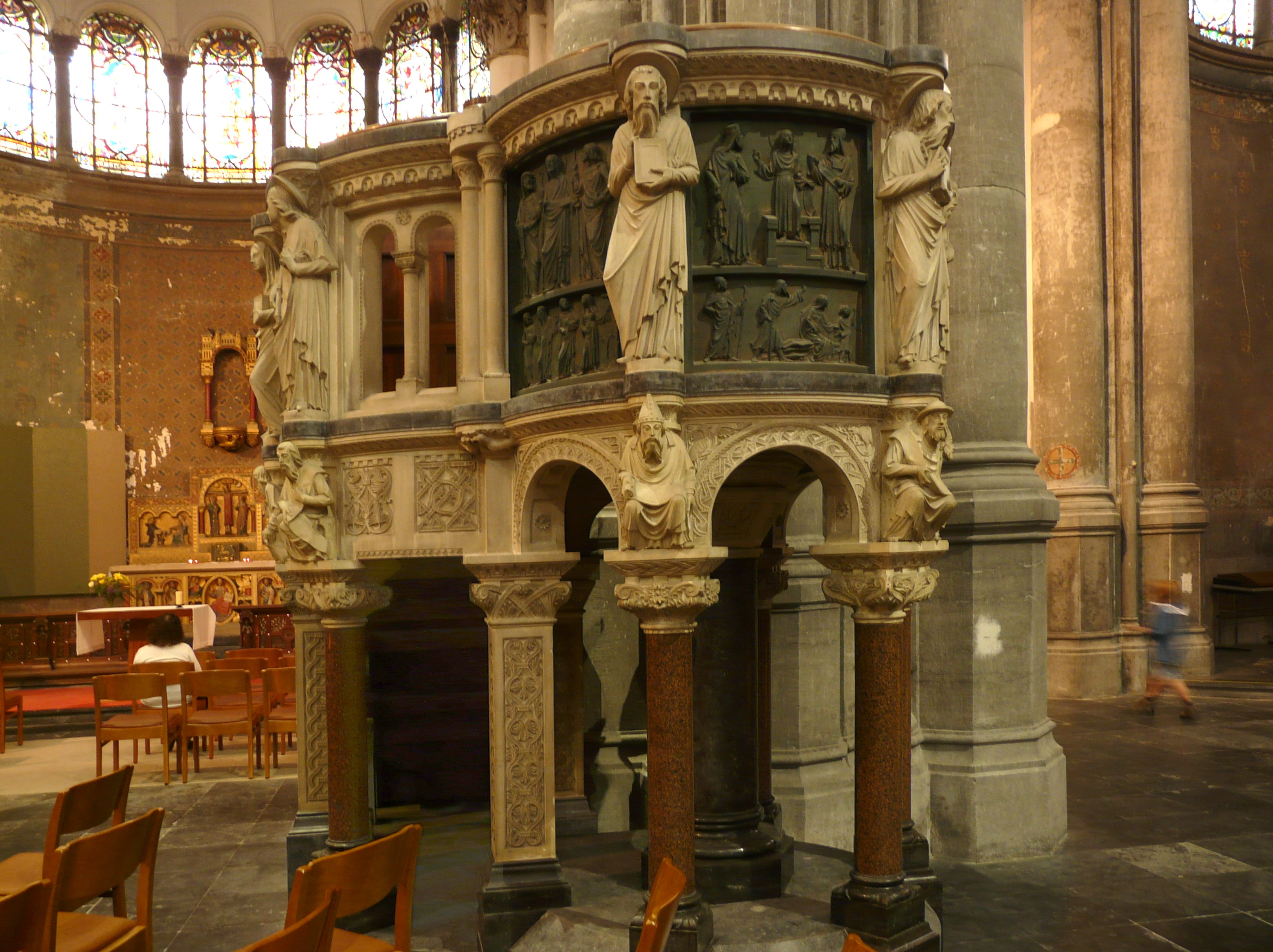 La chaire de l'Église Royale Sainte-Marie à Schaerbeek (région bruxelloise)